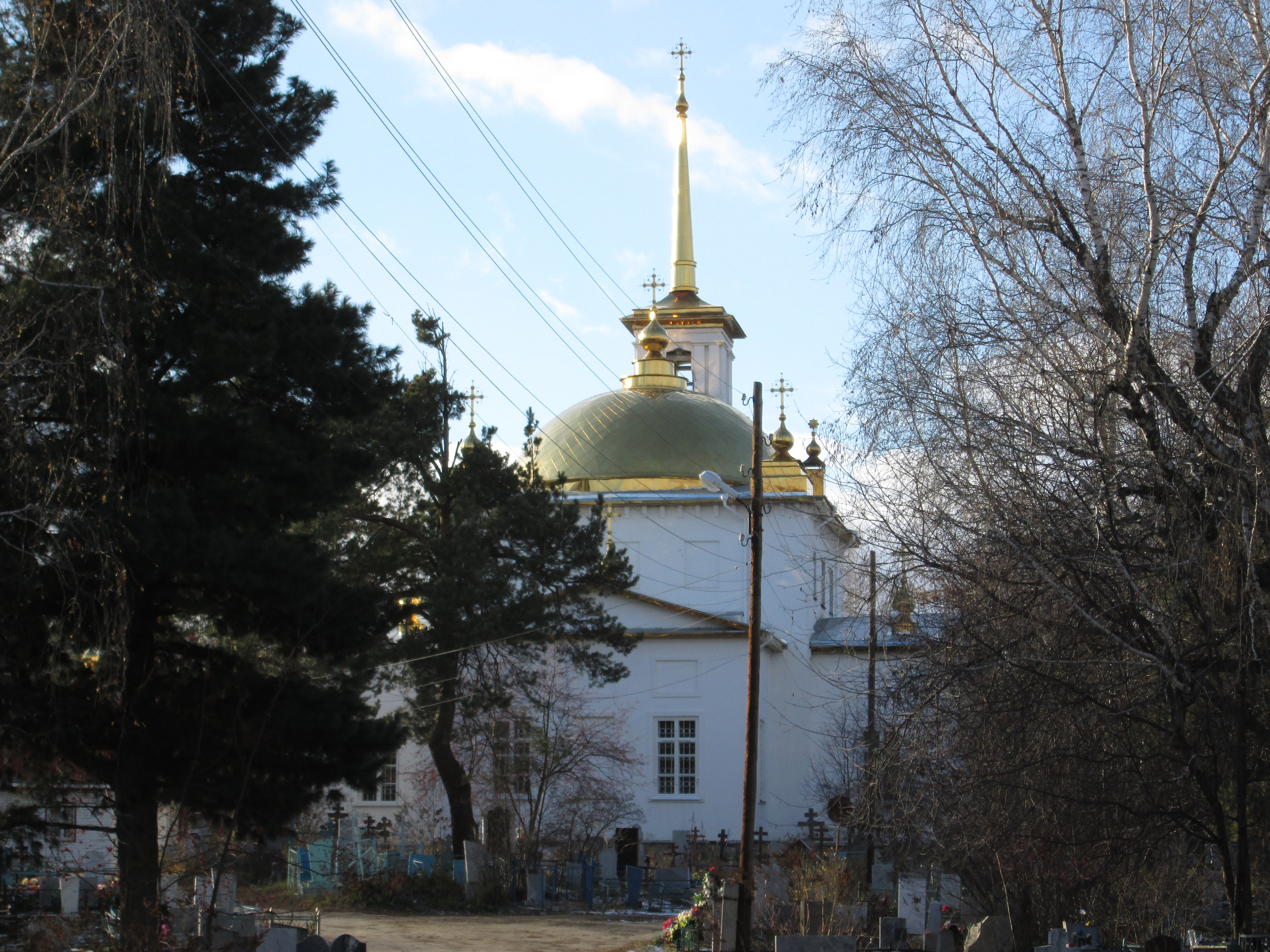 Свято-Троицкая кладбищенская церковь в городе Ирбит.